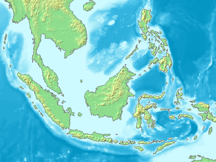 Carte de l'Insulinde Je suis l'auteur de cette carte créée sur DEMIS Mapserver, qui est dans le domaine public. R@vən (d) 7 mars 2008 à 19:01 (CET)